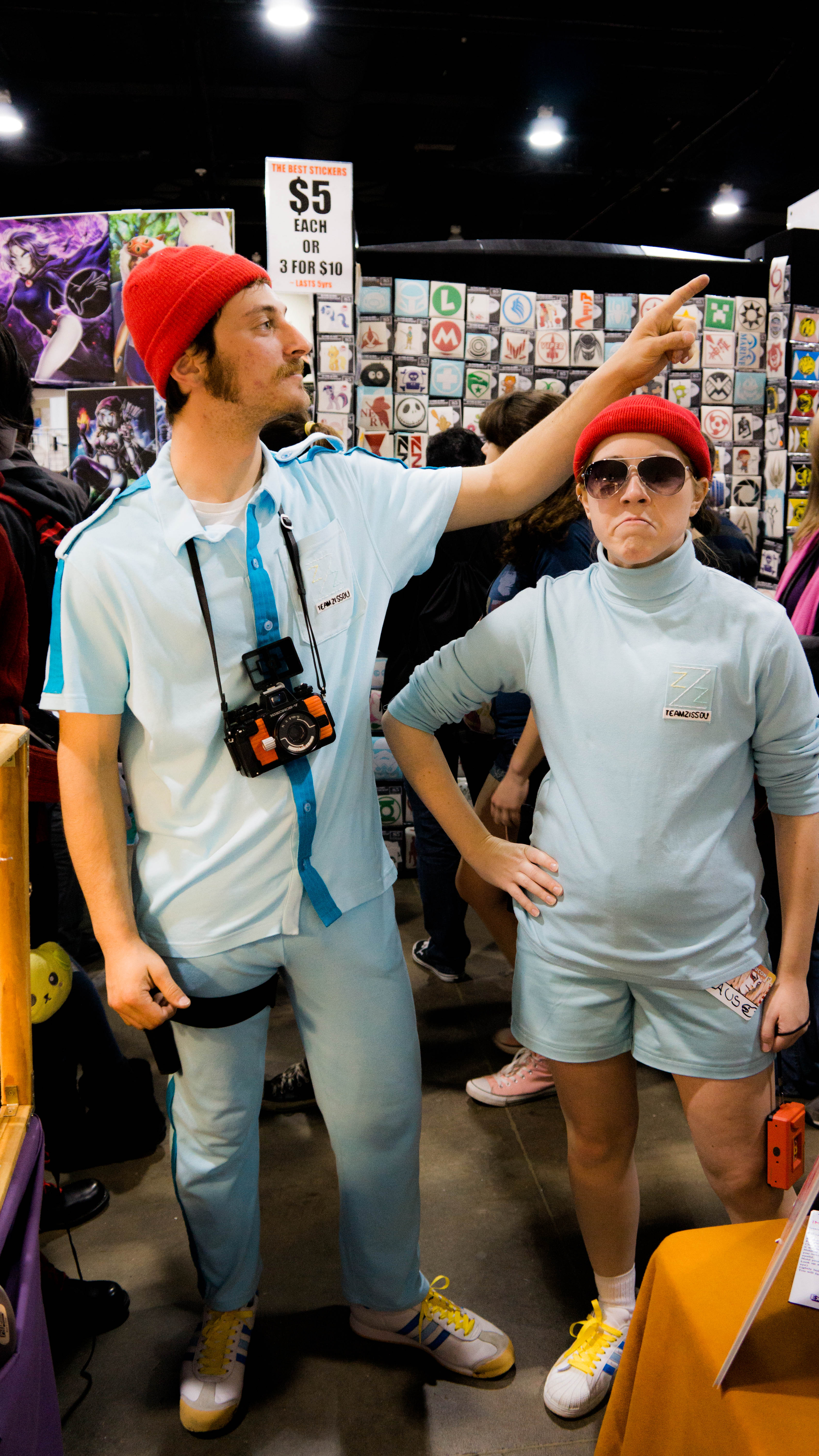 Team Zissou costumes. Katsucon 2013